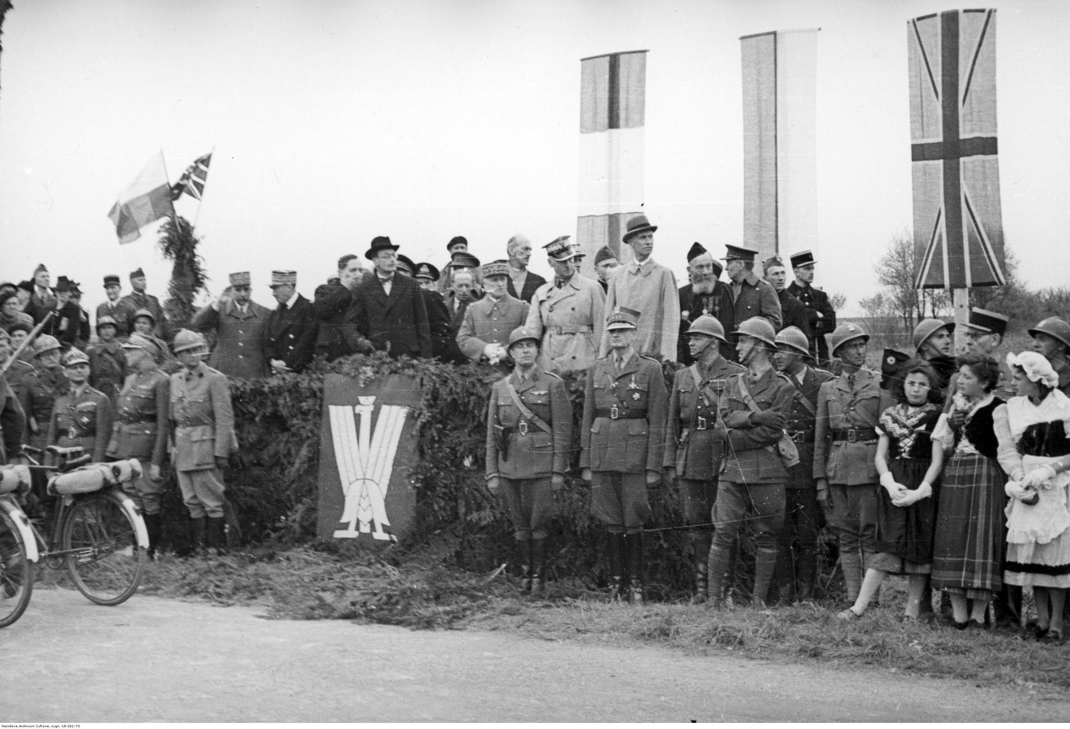 1 Dywizja Grenadierów Wojska Polskiego we Francji - obchody święta 3 Maja i uroczystość nadania miana Grenadierów odbywające się przy szosie Autreville-Martigny - defilada. Na trybunie w pierwszym szeregu od prawej: prezydent RP Władysław Raczkiewicz, gen. Władysław Sikorski, gen. E. Requin, ambasador Howard Kennard, ambasador Leon Noel. Archiwum Fotograficzne Czesława Datki. Sygnatura: 18-261-73